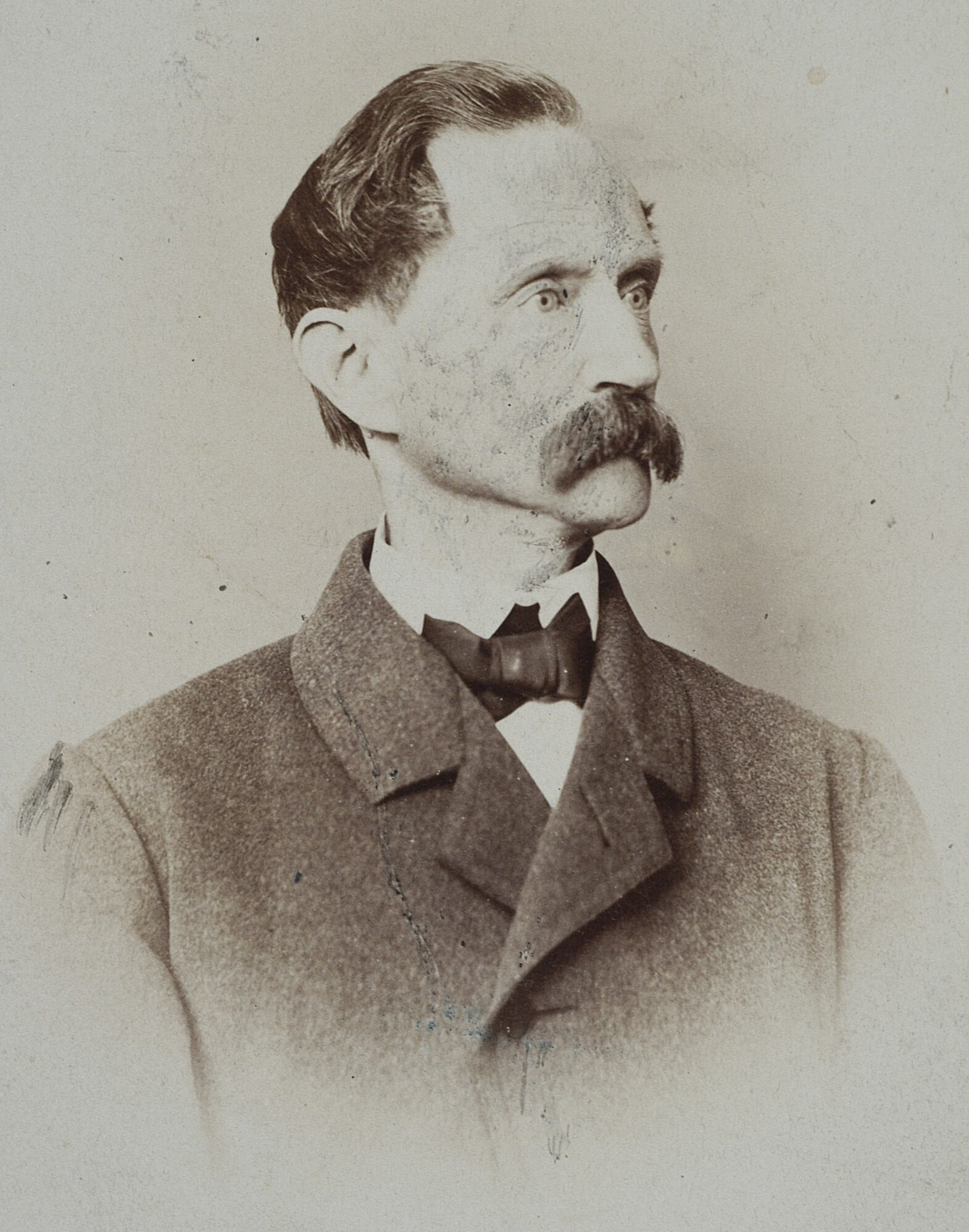 Portret Hipolita Cegielskiego, ok. 1863 r.